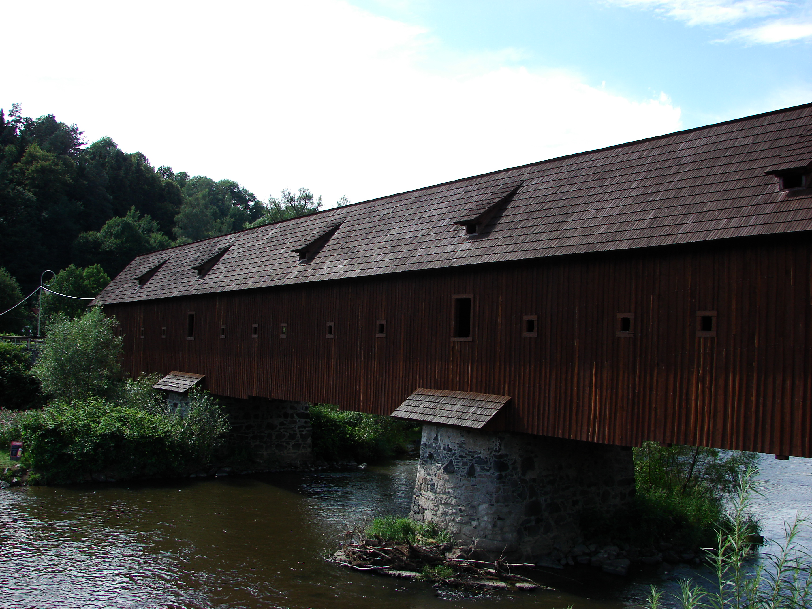 Holzbrücke über den Eger in Radošov